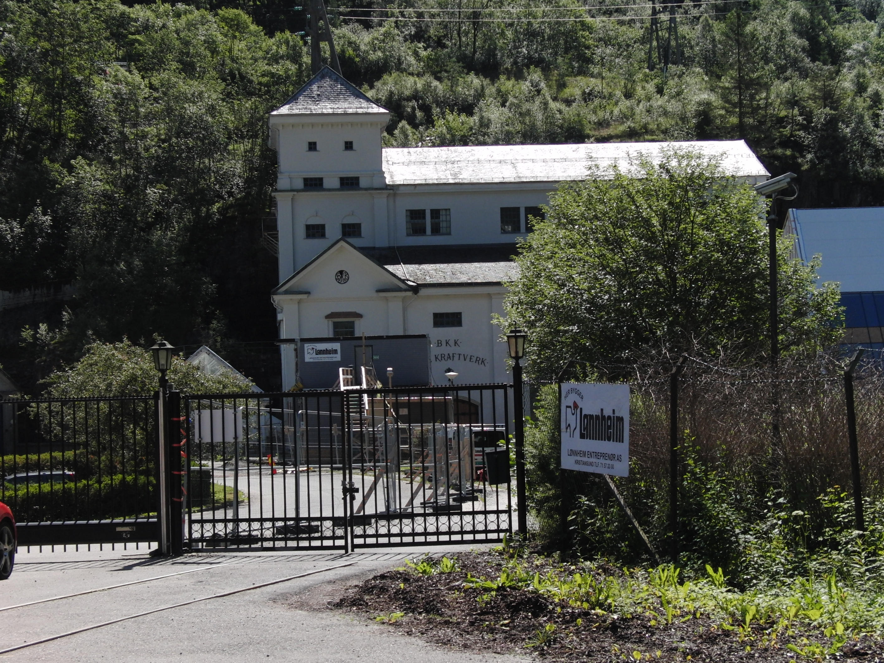 Dale kraftverk